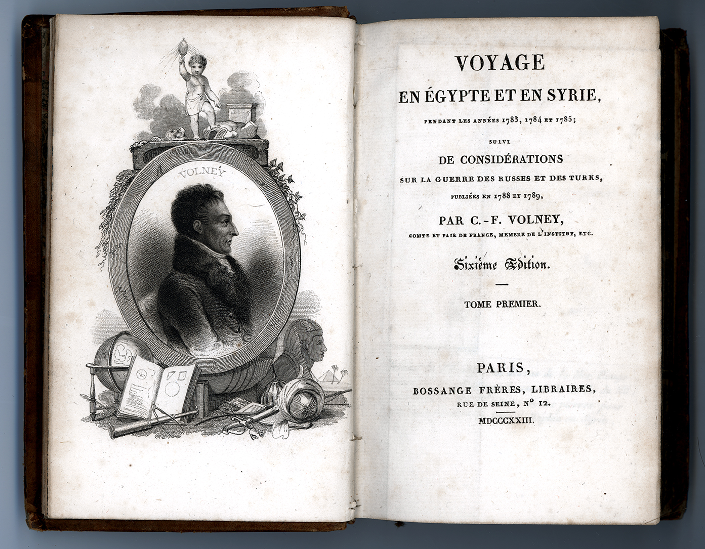 "Voyage en Syrie et en Égypte, pendant les années 1783, 1784 & 1785; suivi de considérations sur la guerre des russes et des turks publiées en 1788 et 1789" - 6ème édition - Paris Bossange frères - 1823